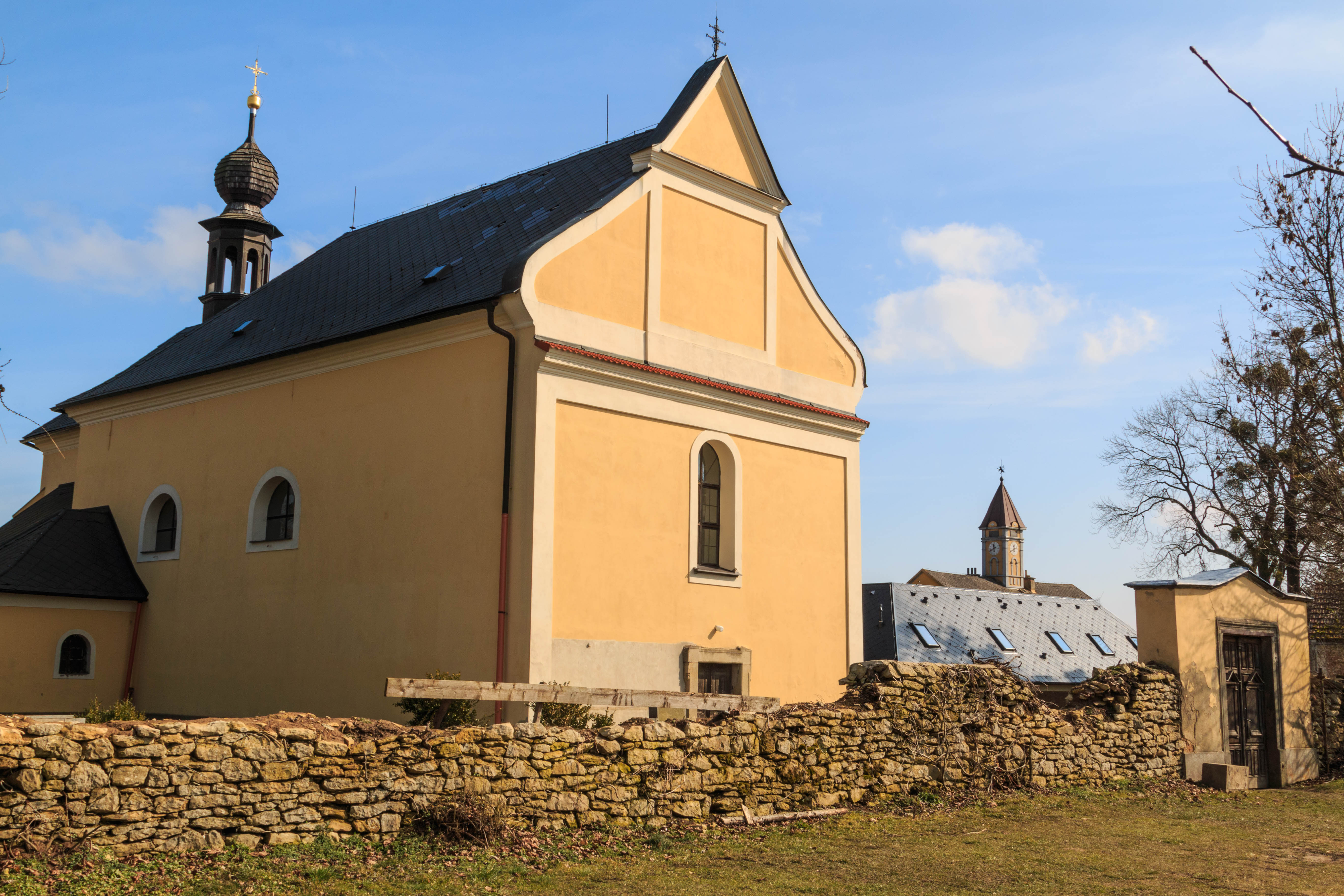 Project: Chráněná území. Trstěnice kostel Nalezení svatého Kříže